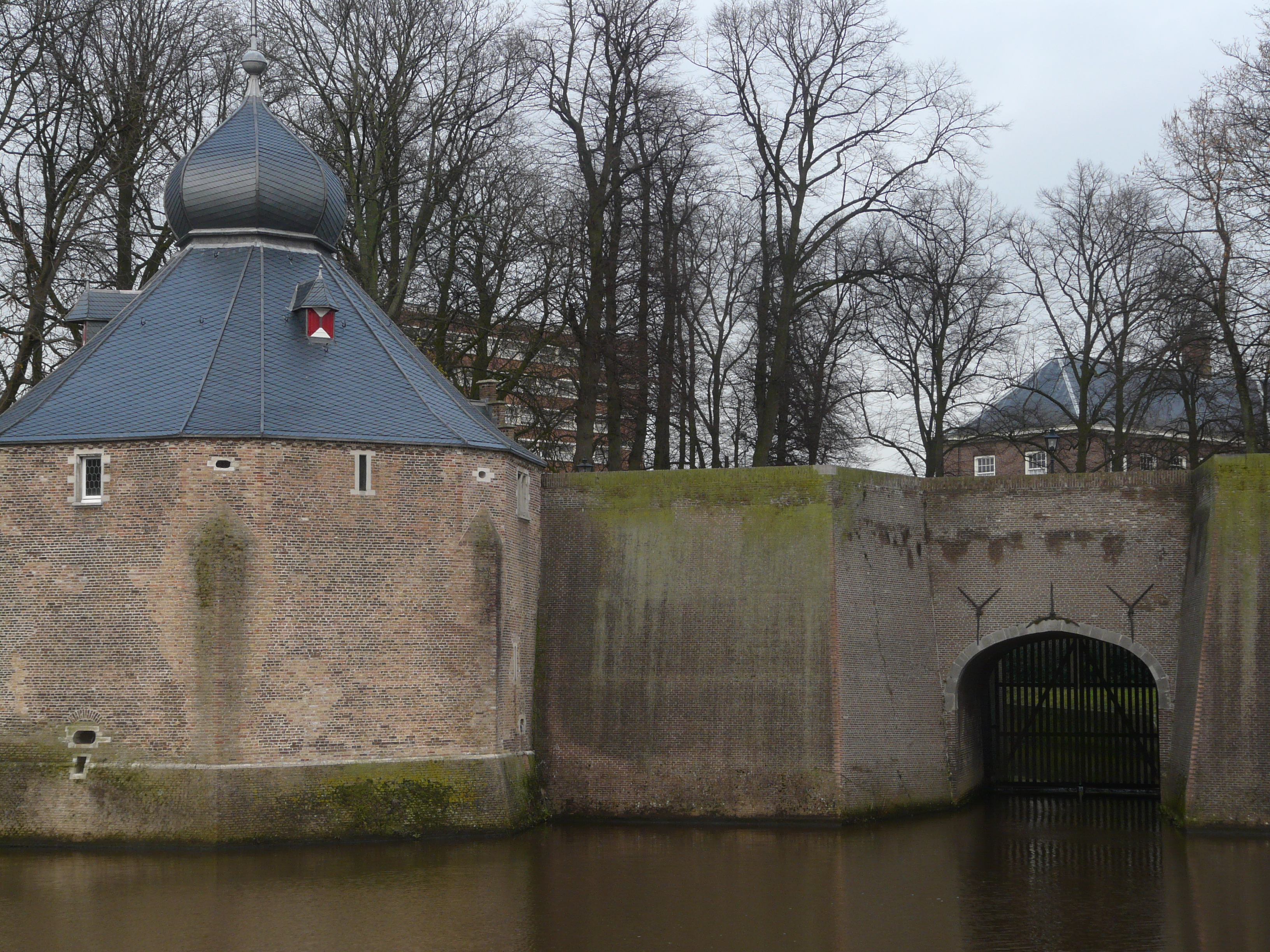 Zicht op deel van de Granaattoren, behorende bij het Kasteel van Breda. Gelegen nabij het Spanjaardsgat en de Haven van Breda. Niet ver van het centrum van Breda